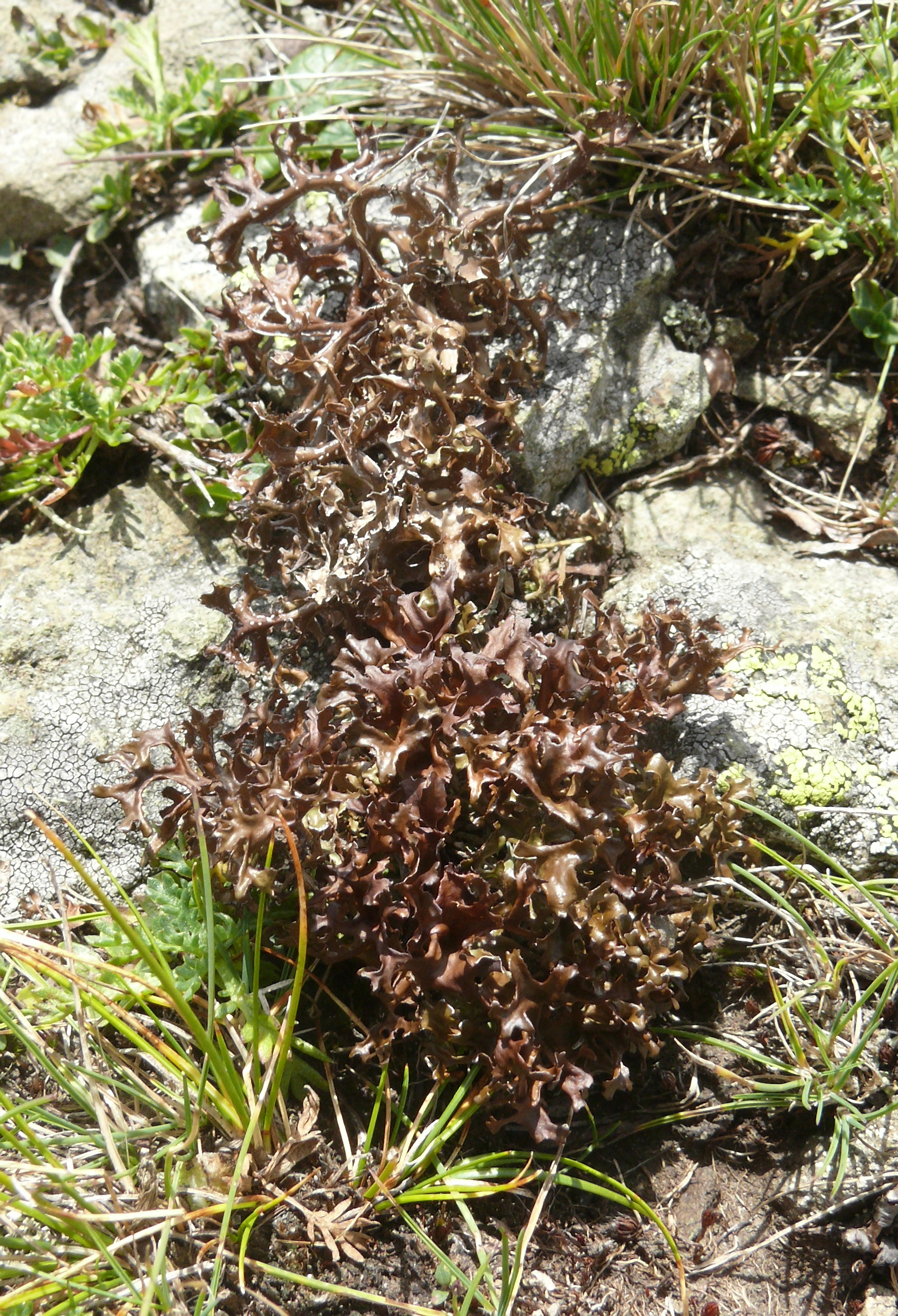 Cetraria islandica, Sarntaler Alpen, Italien